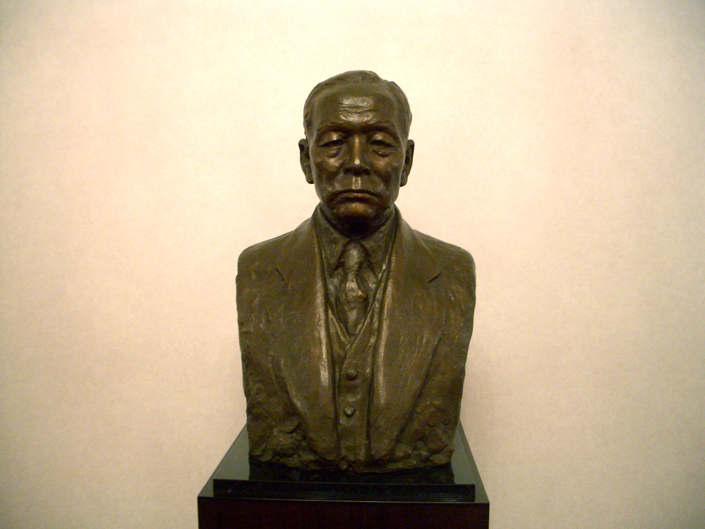 Ichizo Kobayashi,Takarazuka-City Hyogo Japan.